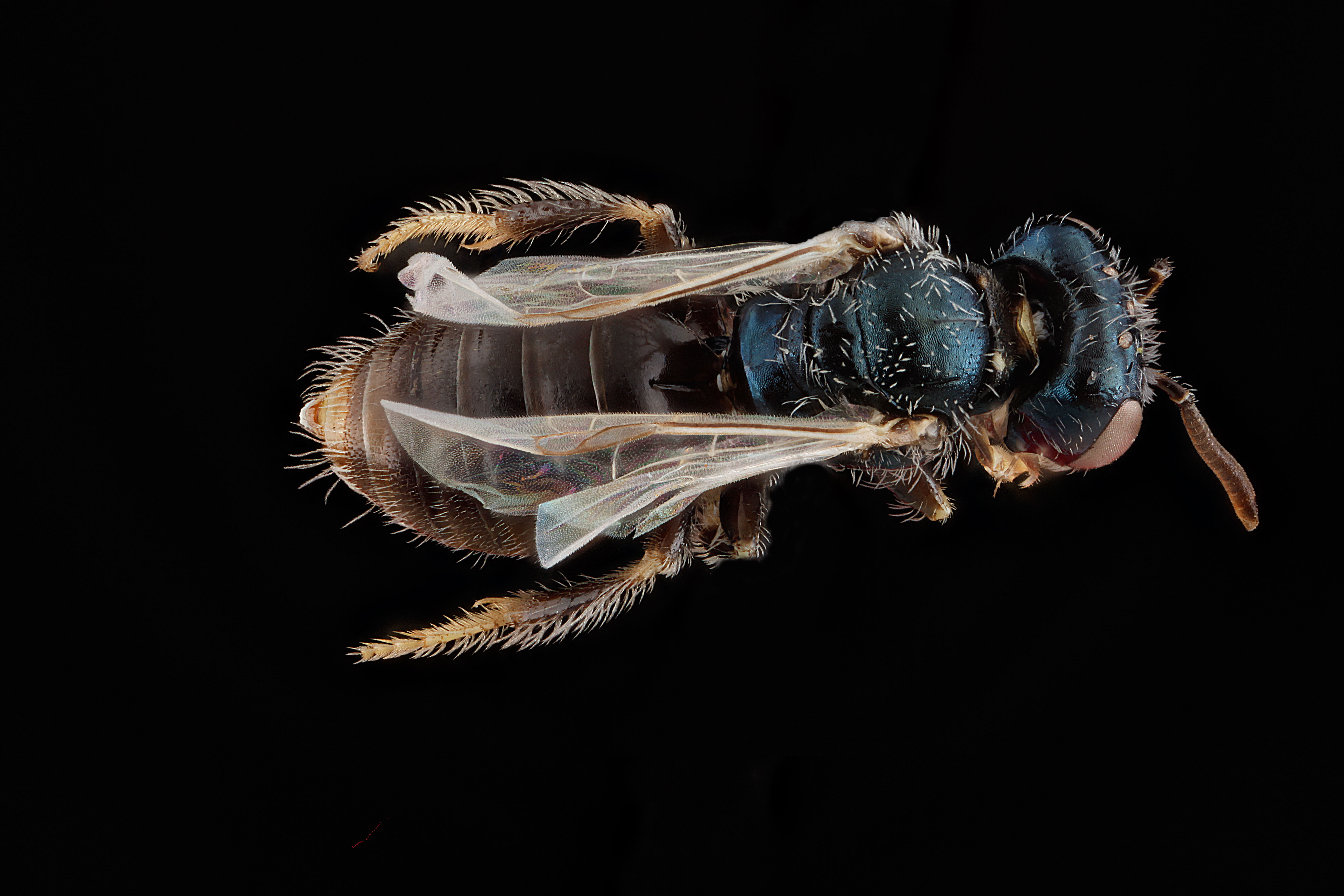 Perdita bishoppi, Florida, Fort Matanzas National Monument, male